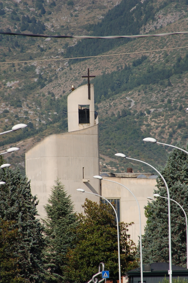 Sulmona 2011